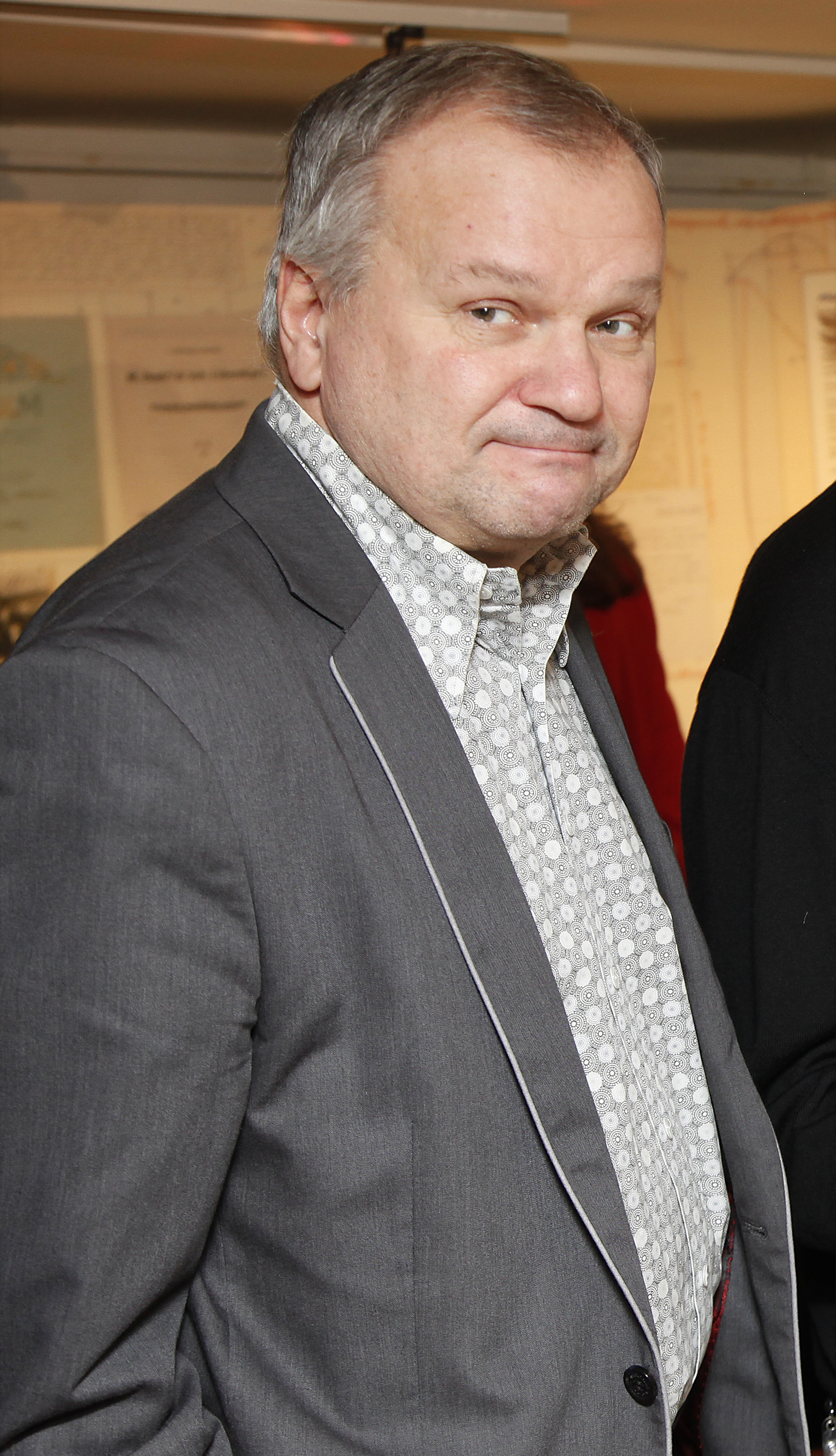 Küllo Arjakas, ajaloolane ja poliitik Tallinna Linnamuuseumis 2014